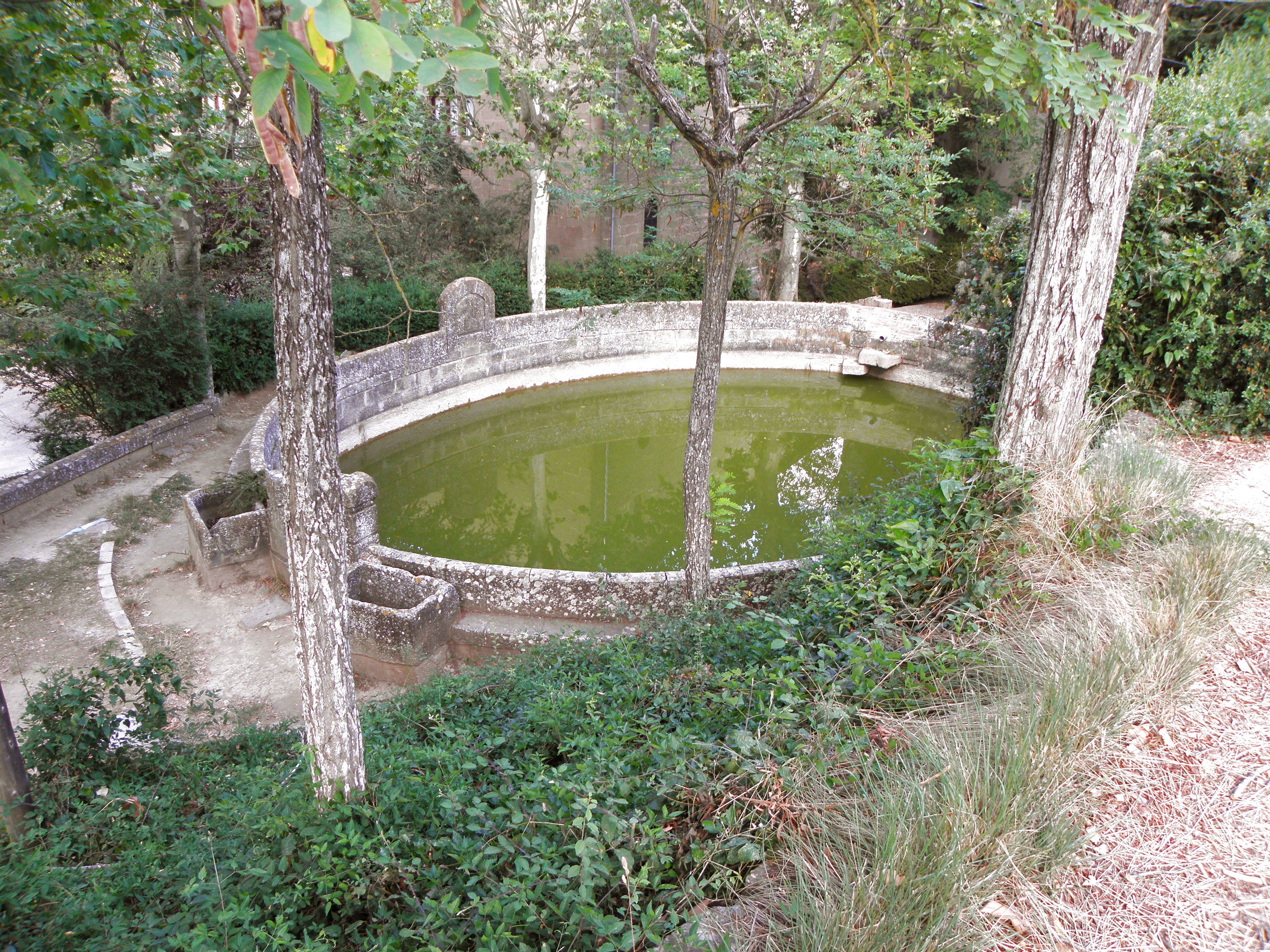 El Miracle (Riner, Solsonès). La bassa de la plaça.